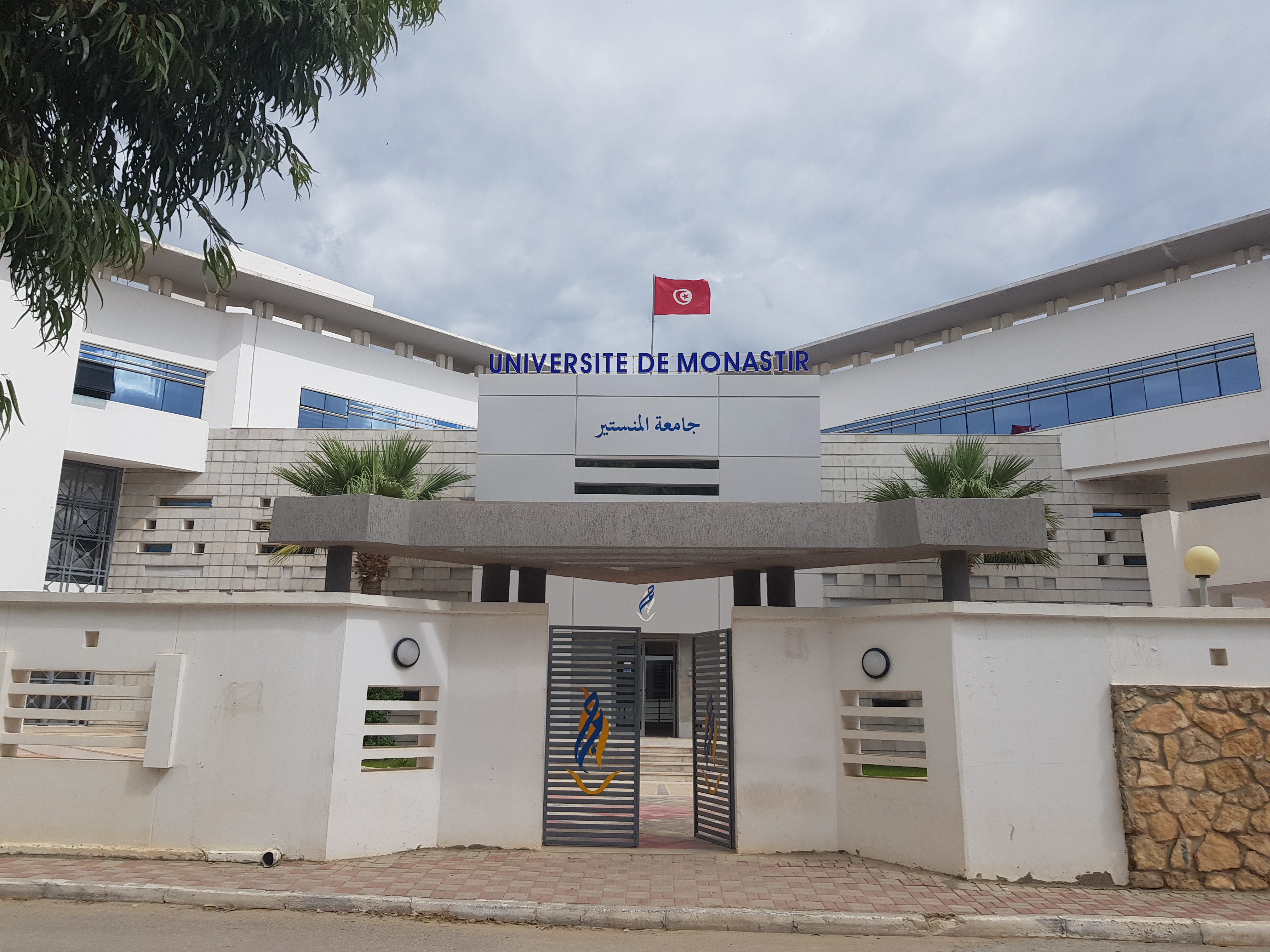 Entréé université de Monastir